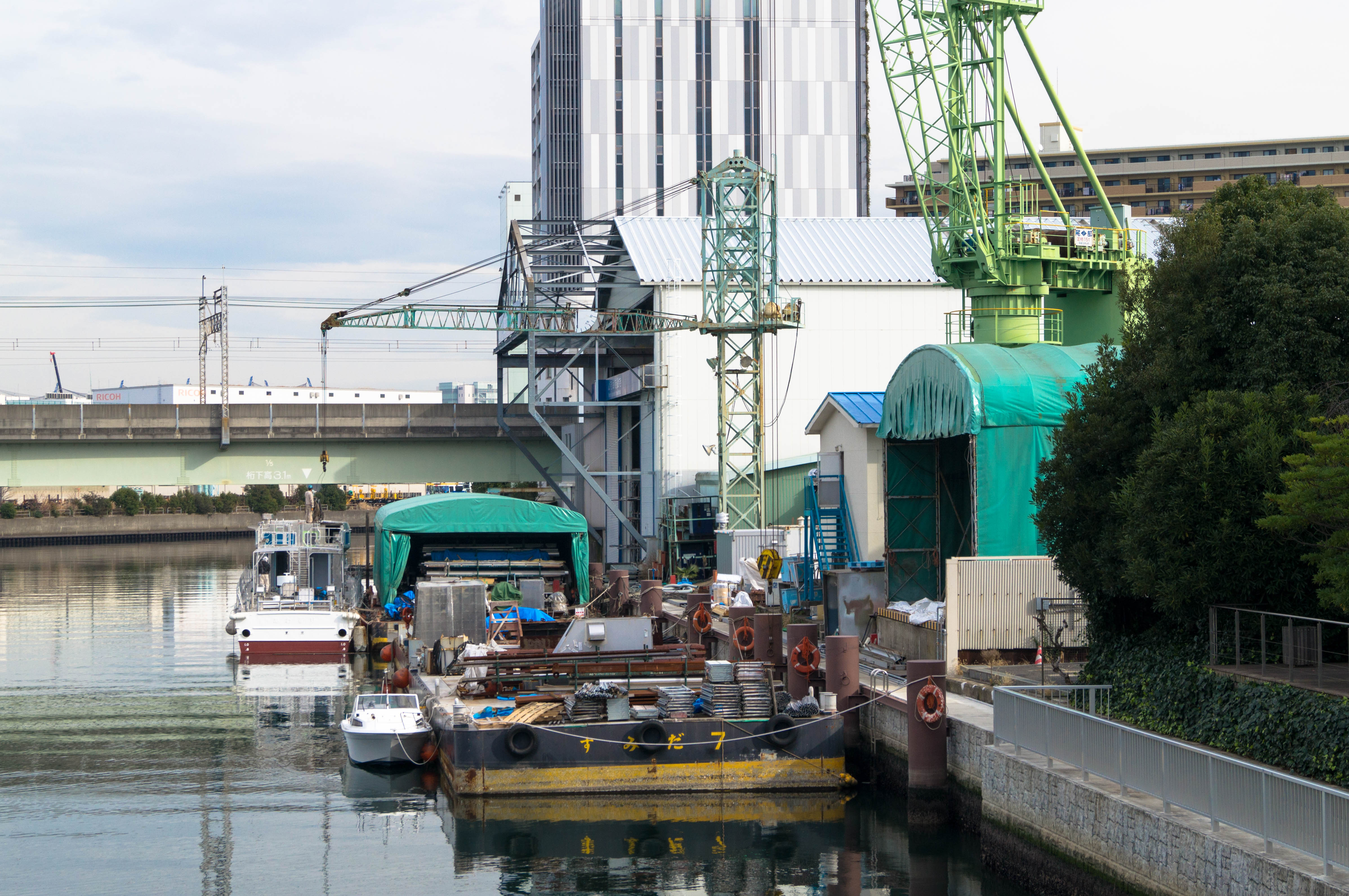 東京都江東区潮見の隅田川造船本社工場。（2016年12月29日撮影）